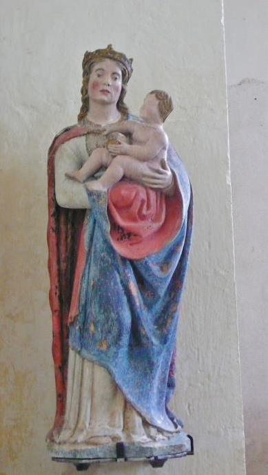 Vierge à l'Enfant dans l'église d'Attignéville (Vosges). Pierre peinte. 16e siècle.Inscrite au répertoire des MH